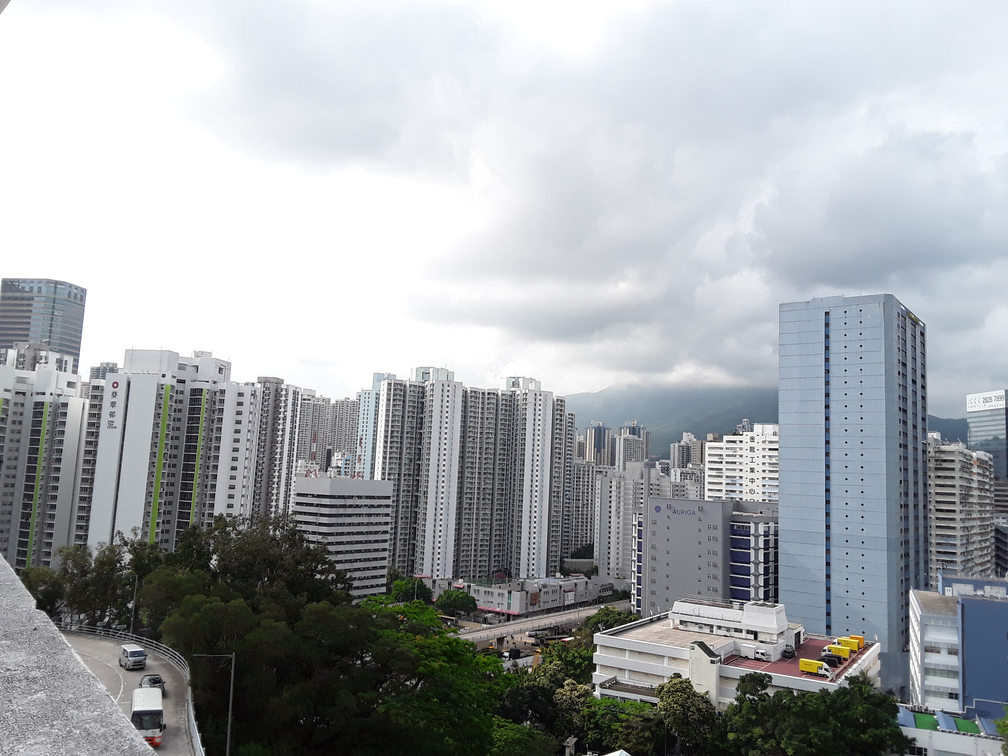 攝於麗瑤邨商場平台